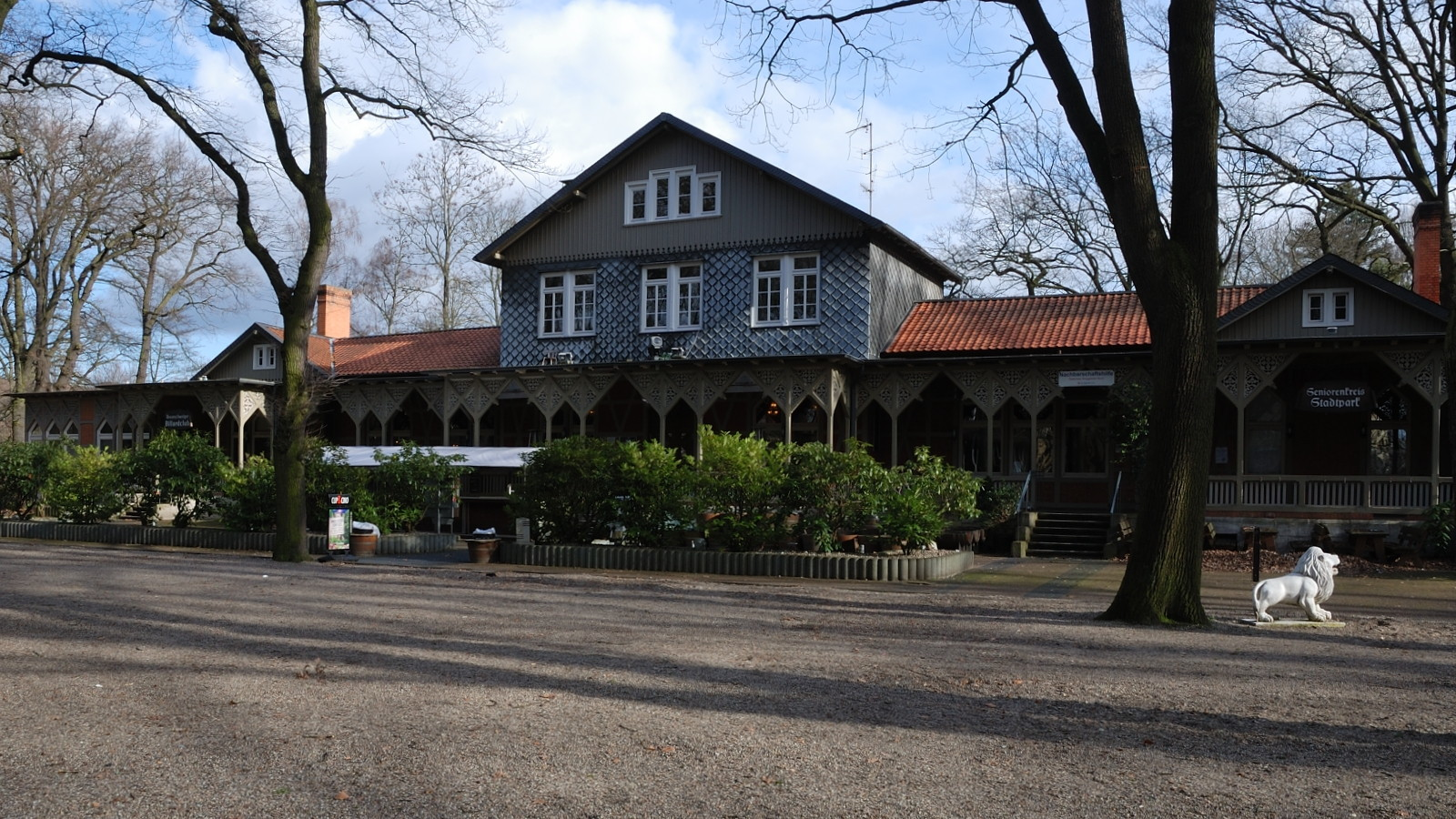 Stadtparkrestaurant, Jasperallee 42 in Braunschweig